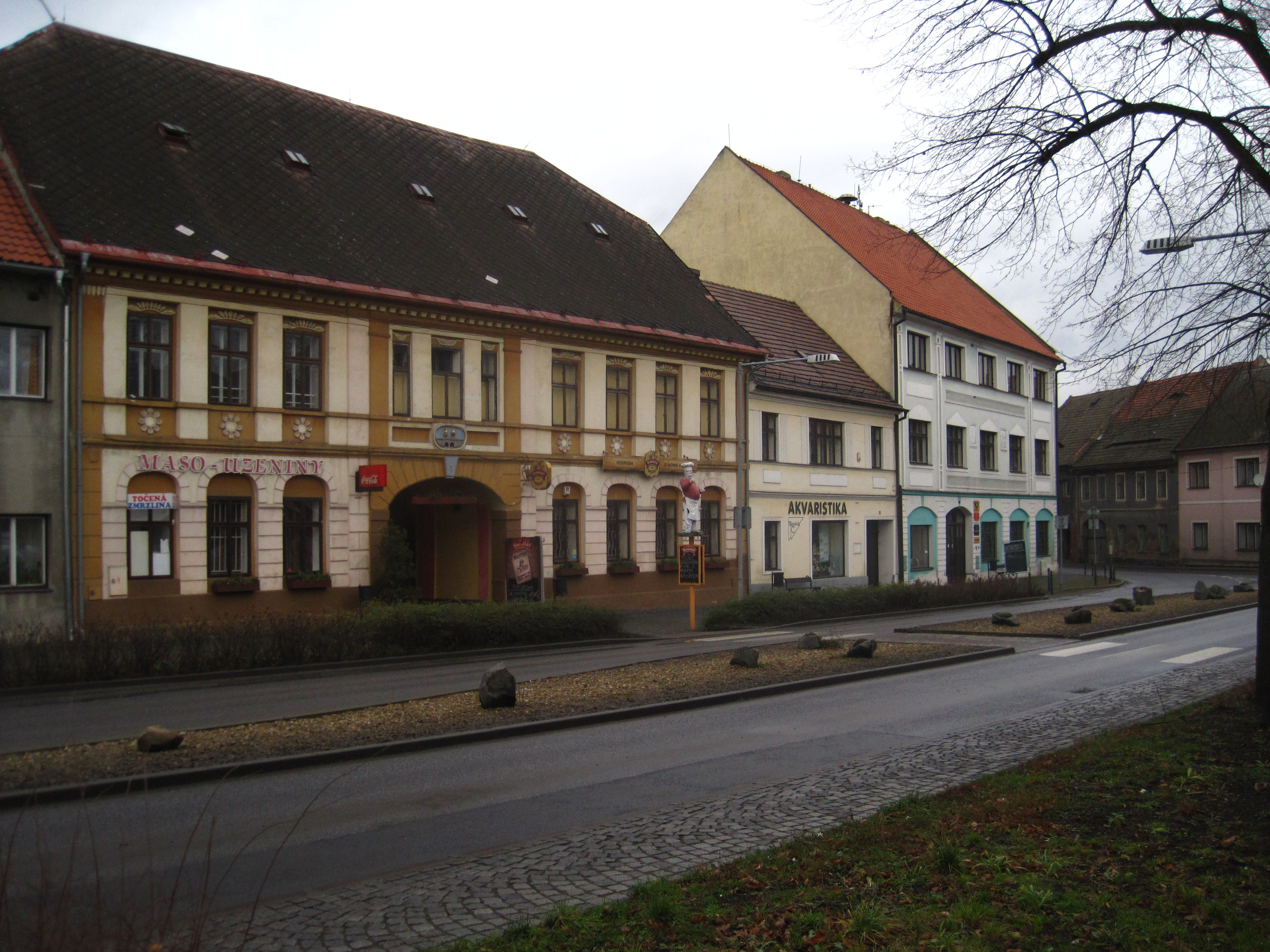 Dům čp. 1, náměstí 1, Kravaře (okres Česká Lípa).